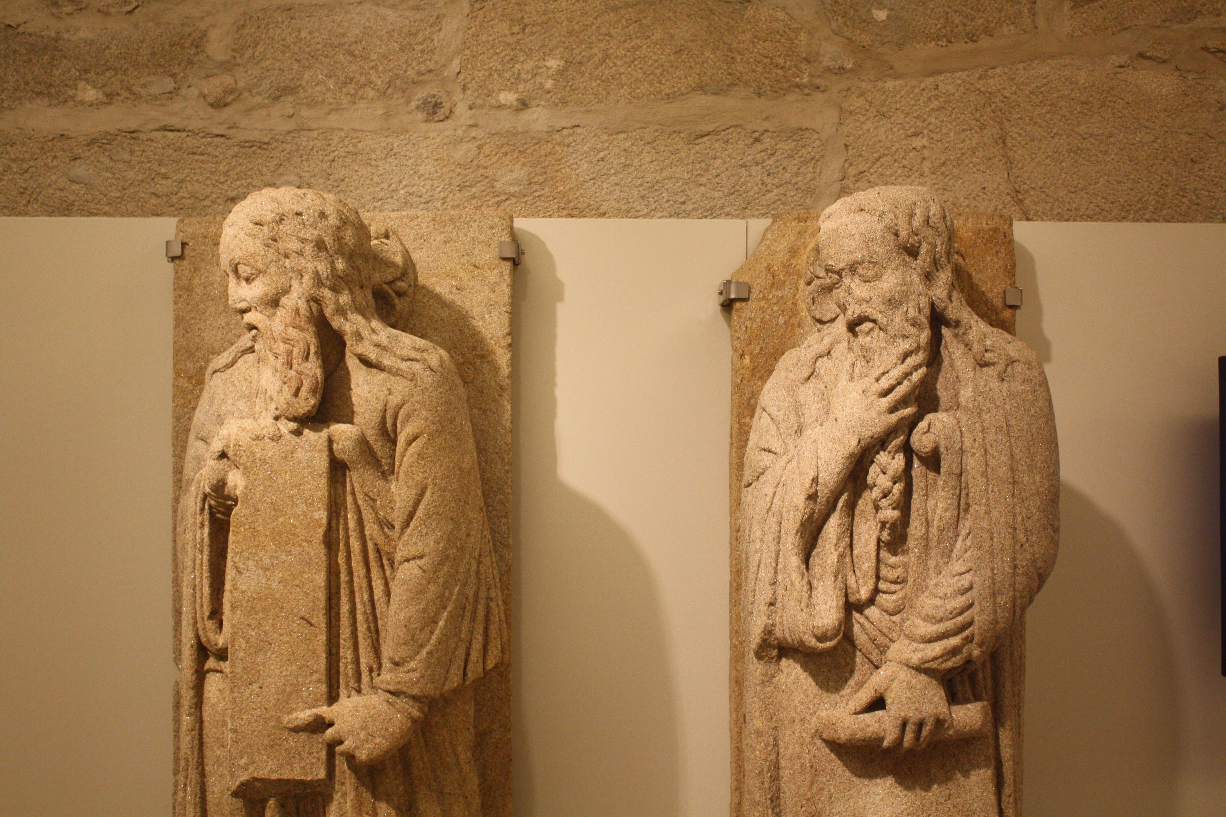 Dous profetas, procedentes da fachada exterior do Pórtico da Gloria. Desta fachada, desmontada no século XVI, consérvanse seis estatuas, entre as que están estas dúas expostas no Edificio Sarmiento do Museo de Pontevedra.